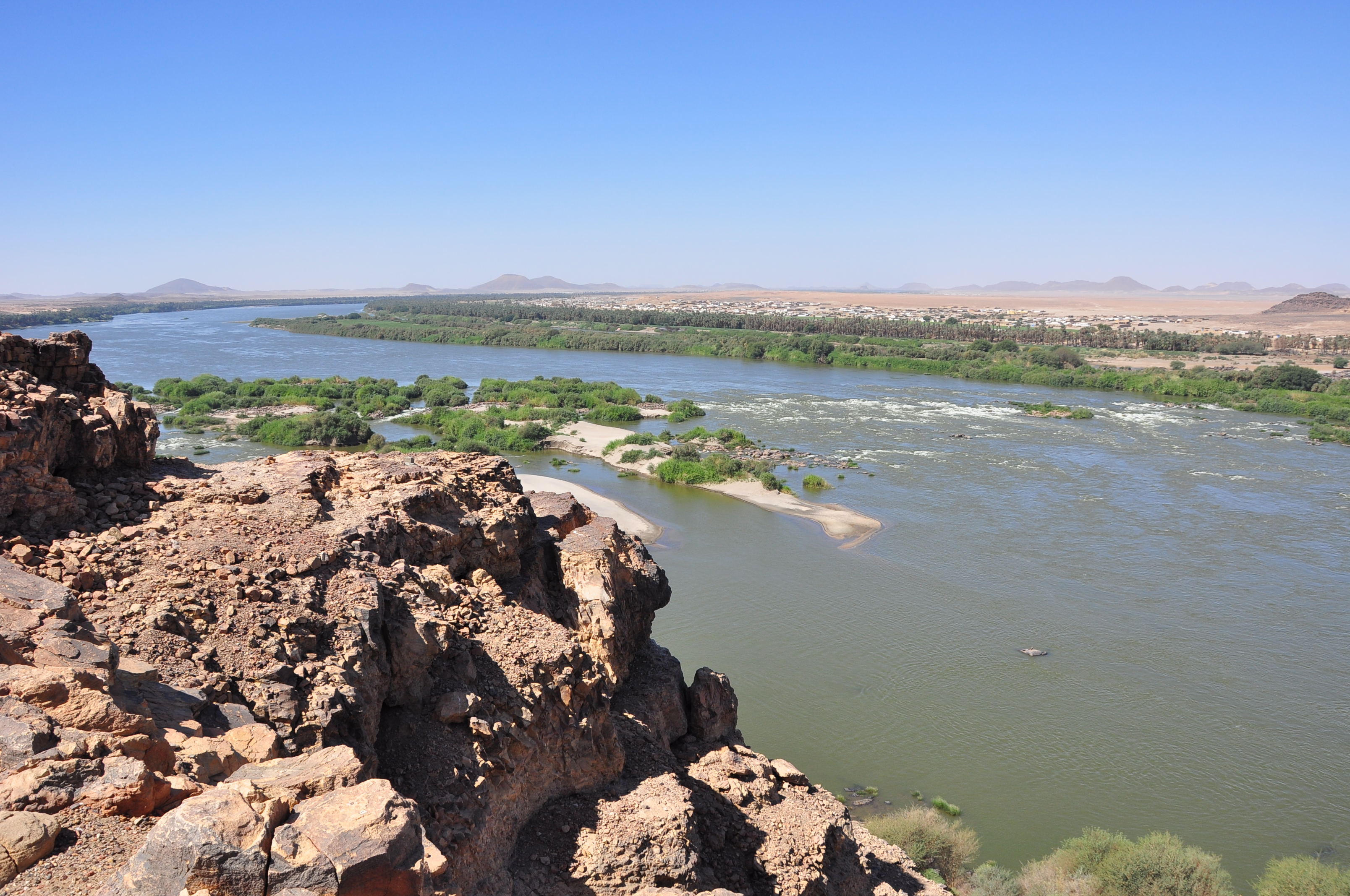 Blick auf den Nil am 3.Katarakt / Sudan